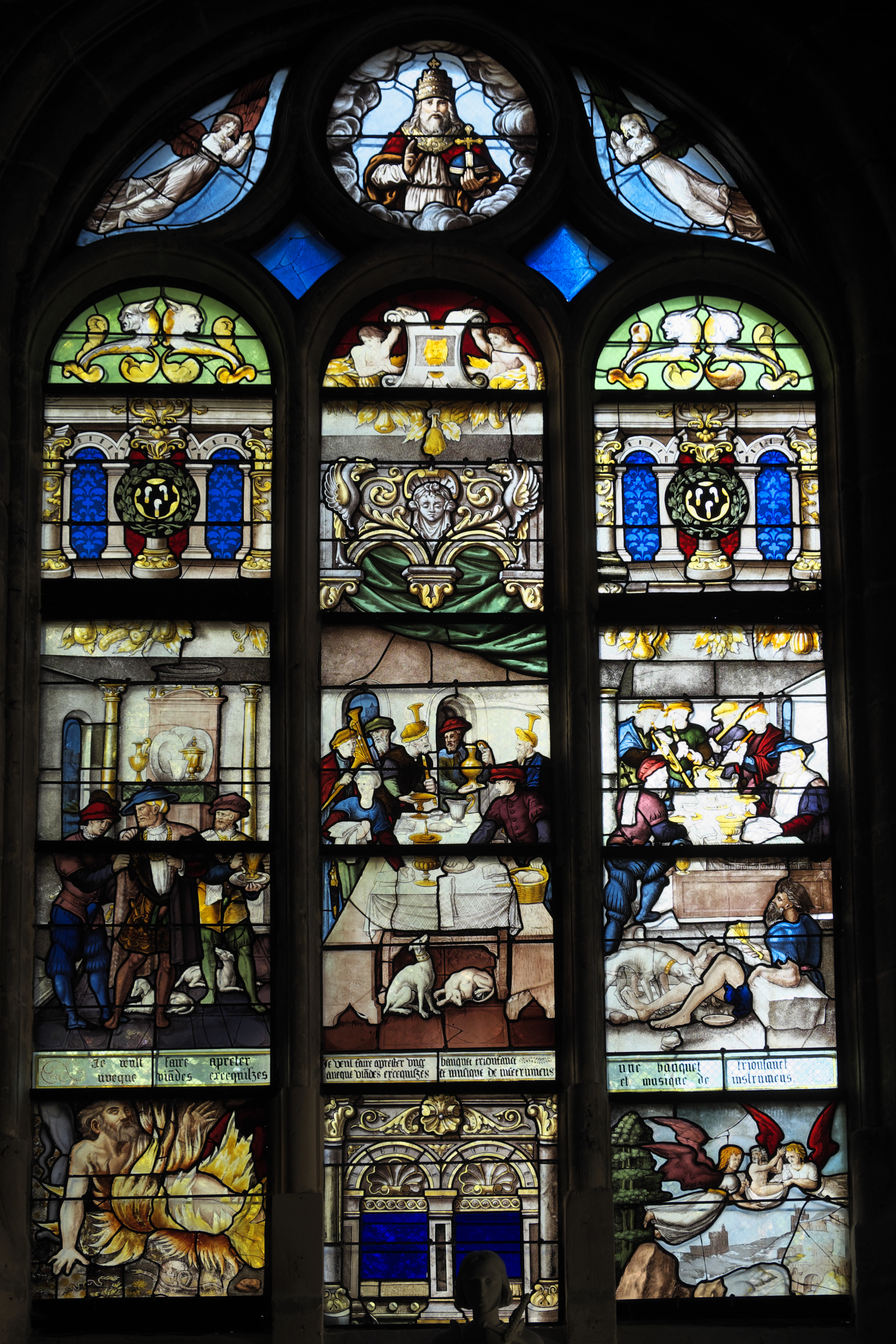 Katholische Pfarrkirche Saint-Germain in Andrésy im Département Yvelines (Île-de-France/Frankreich), Bleiglasfenster aus der Mitte des 16. Jahrhunderts; Darstellung: Armer Lazarus vor dem Haus des Reichen